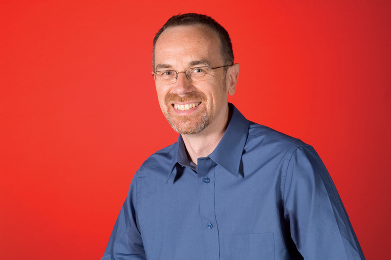 Photo officielle de Guy Bertrand